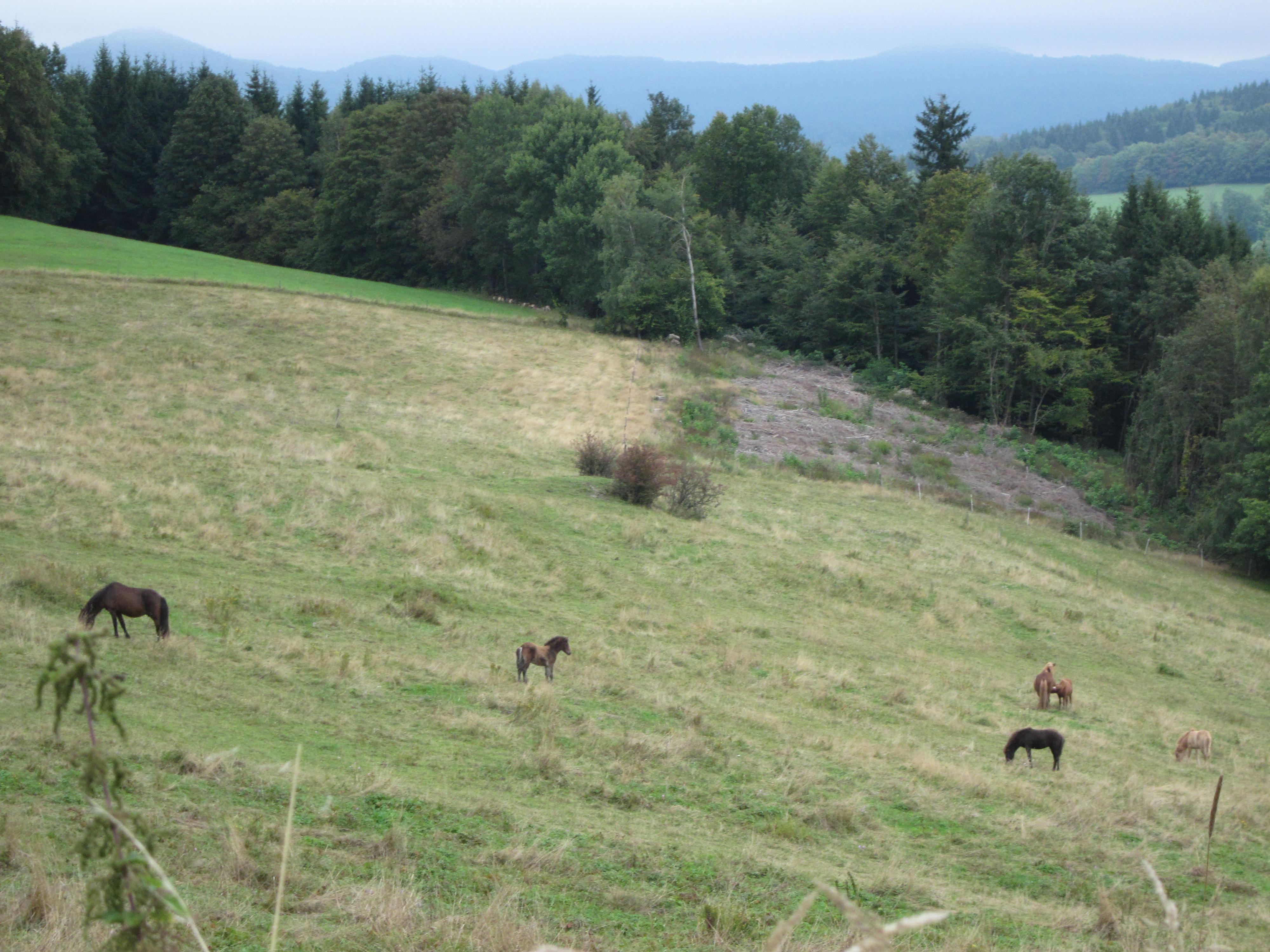 NSG Schwarze Berge in der Bayer. Hochrhön, Blick über Pferdeweide auf die Berge der Dammersfeldkette